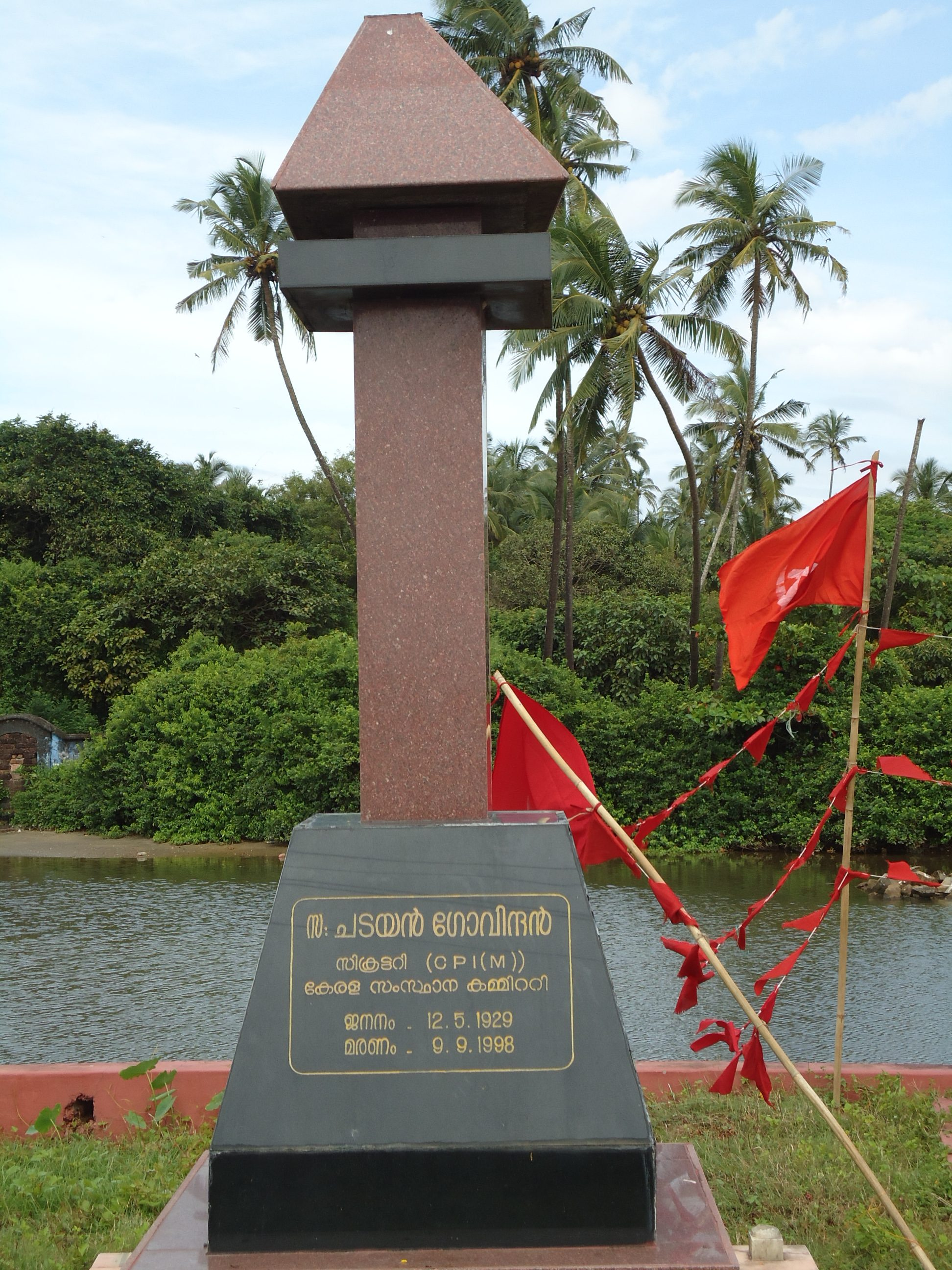 ചടയൻ ഗോവിന്ദന്റെ ശവകുടീരം